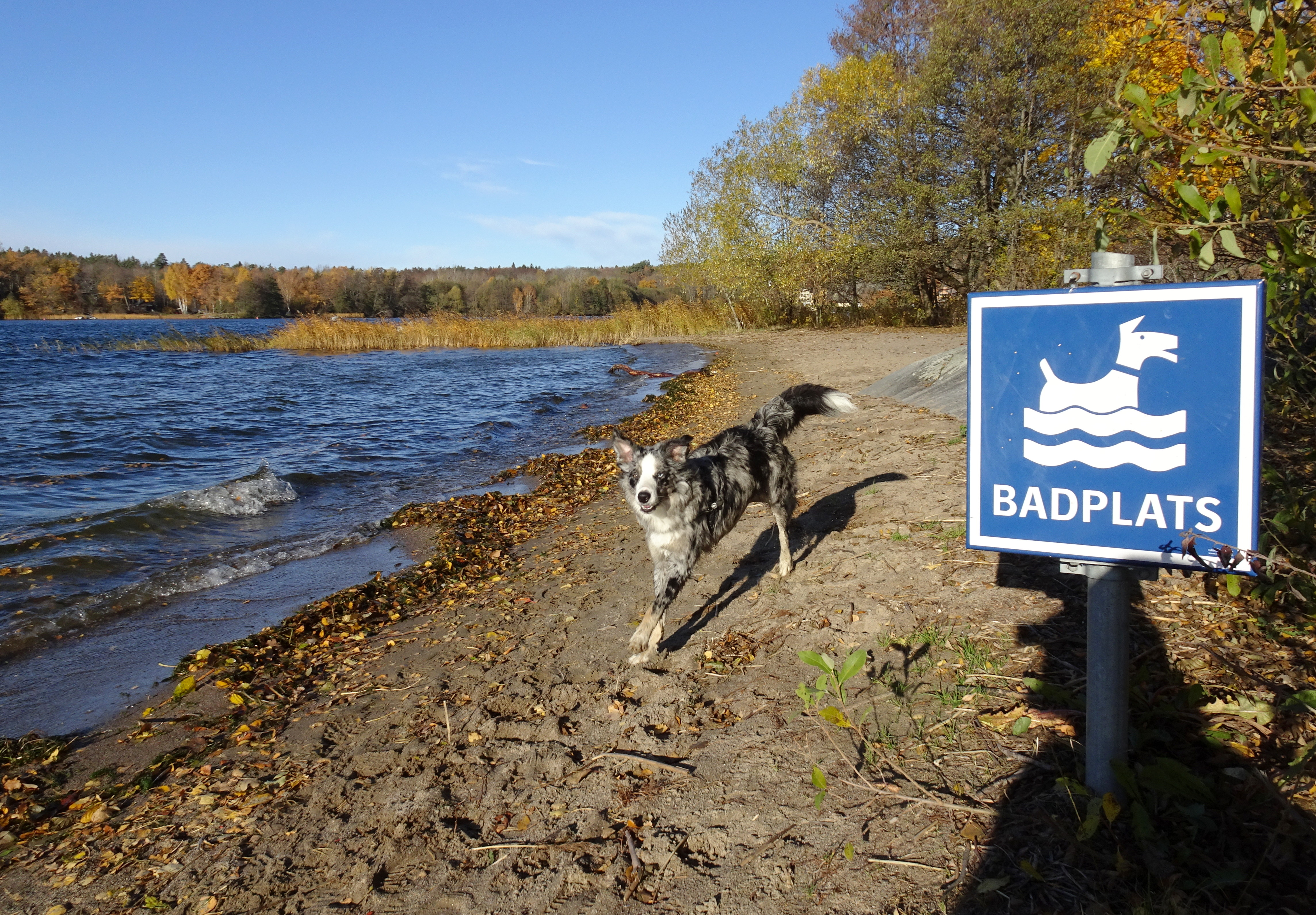 Sätrabadet, hundbadplats